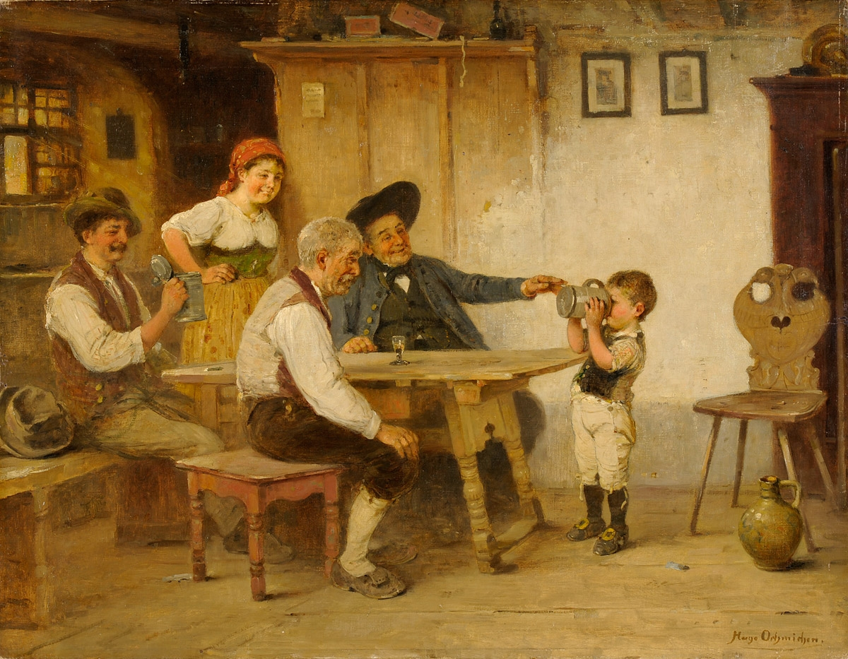 Der erste Schluck. Signiert. Öl auf Leinwand, 70 x 90 cm